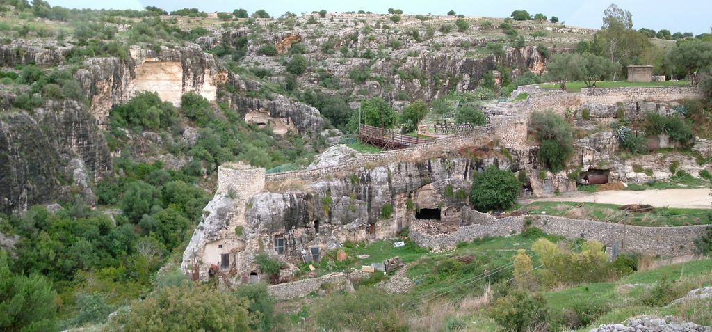 Cava Ispica e il Fortilitium - Parco Forza